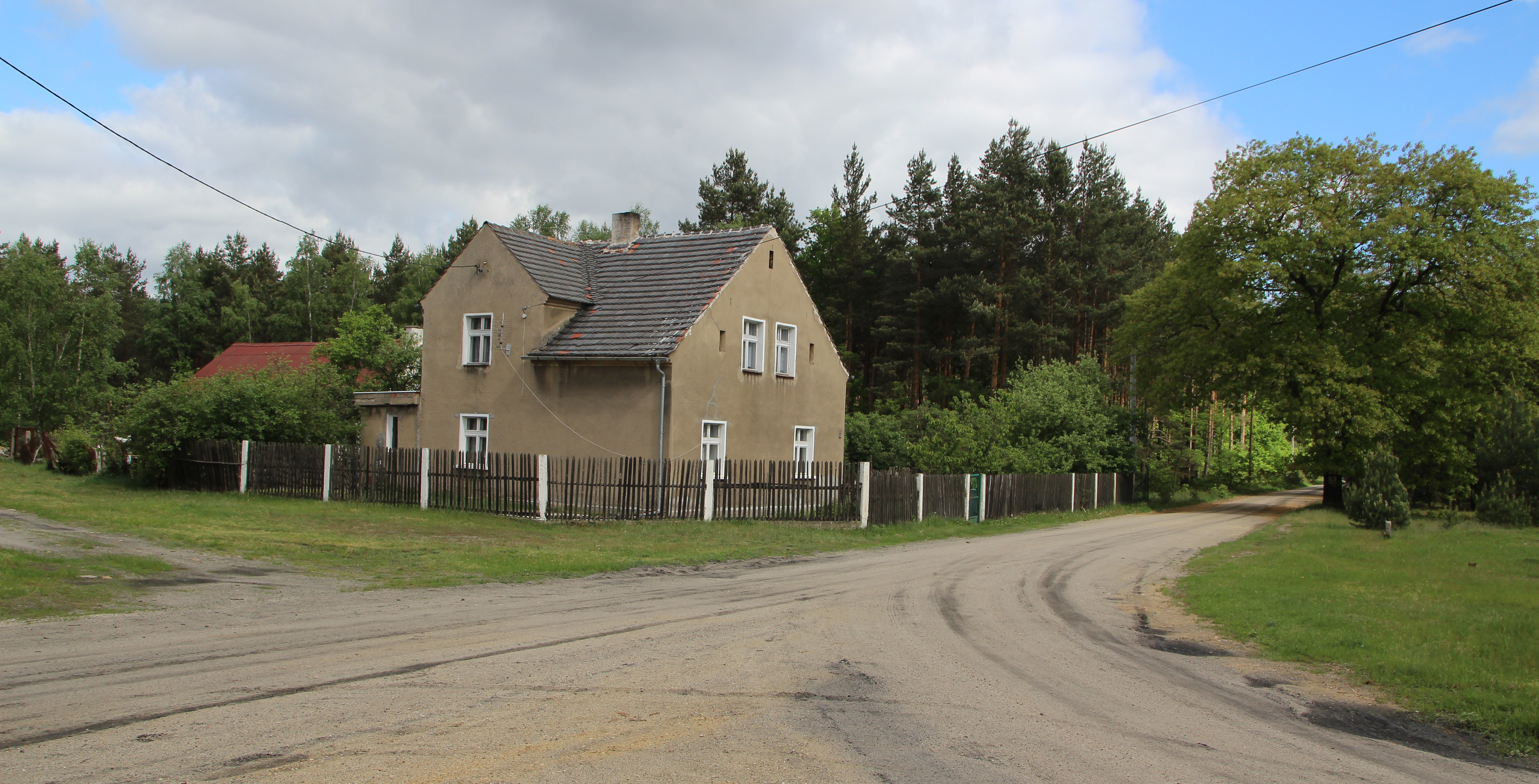 Dom w Polanie - wieś w Polsce w województwie dolnośląskim w powiecie zgorzeleckim, w gminie Węgliniec.